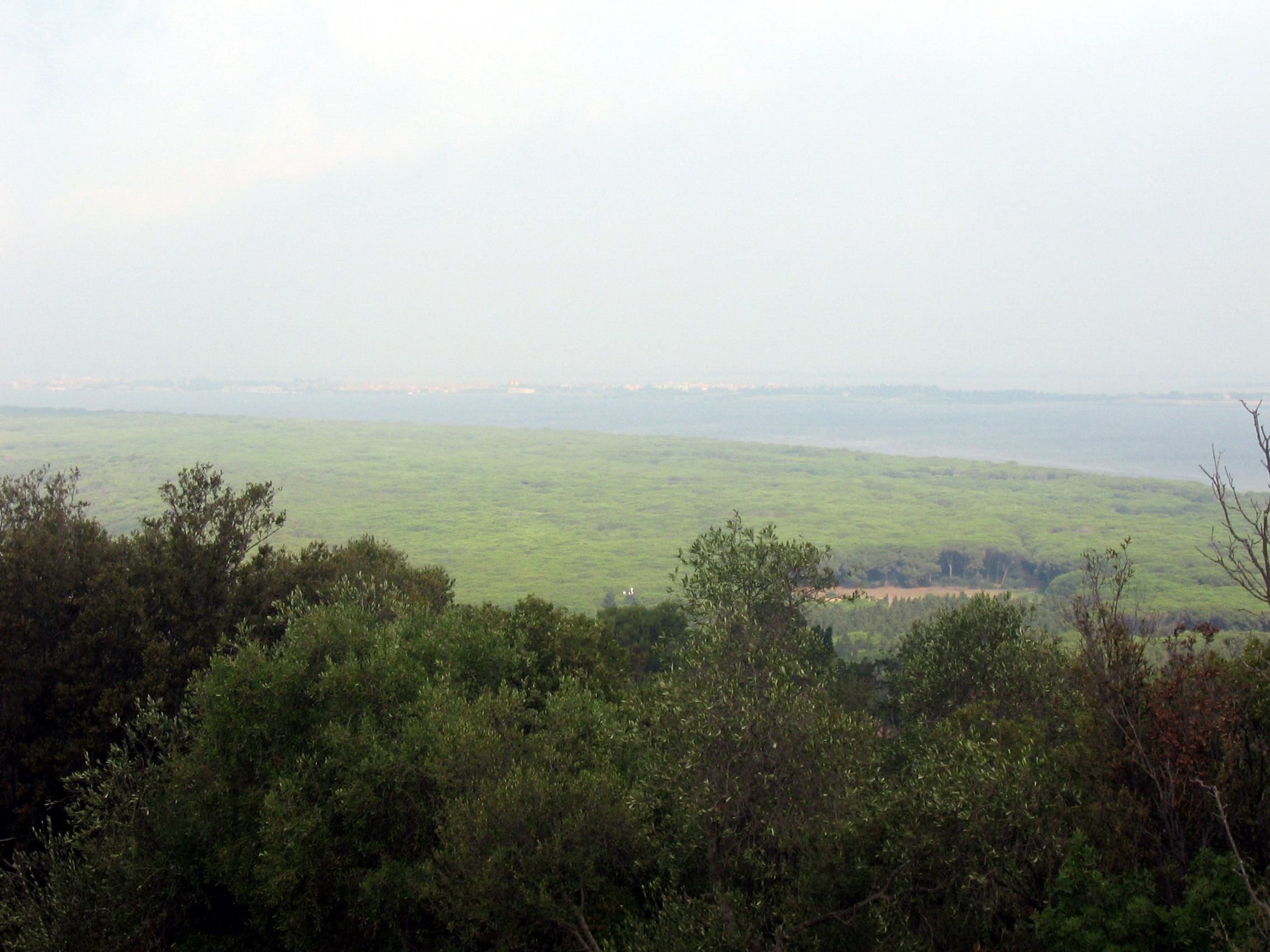 Tombolo della Feniglia, Orbetello, Toscana, Italy